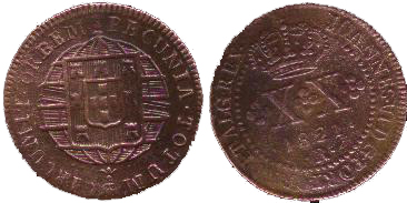 Vintém de cobre. Moeda de 20 réis de cobre, cunhada na Casa da Moeda do Rio de Janeiro (Letra Monetária R) por D. João VI em 1821. Moeda de nº 508 no "Livro das moedas do Brasil" de Claudio Amato, Irlei Neves e Arnaldo Russo (11ª edição).